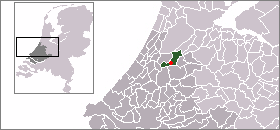 Locatie van Woubrugge aangegeven binnen de voormalige gemeente Jacobswoude.